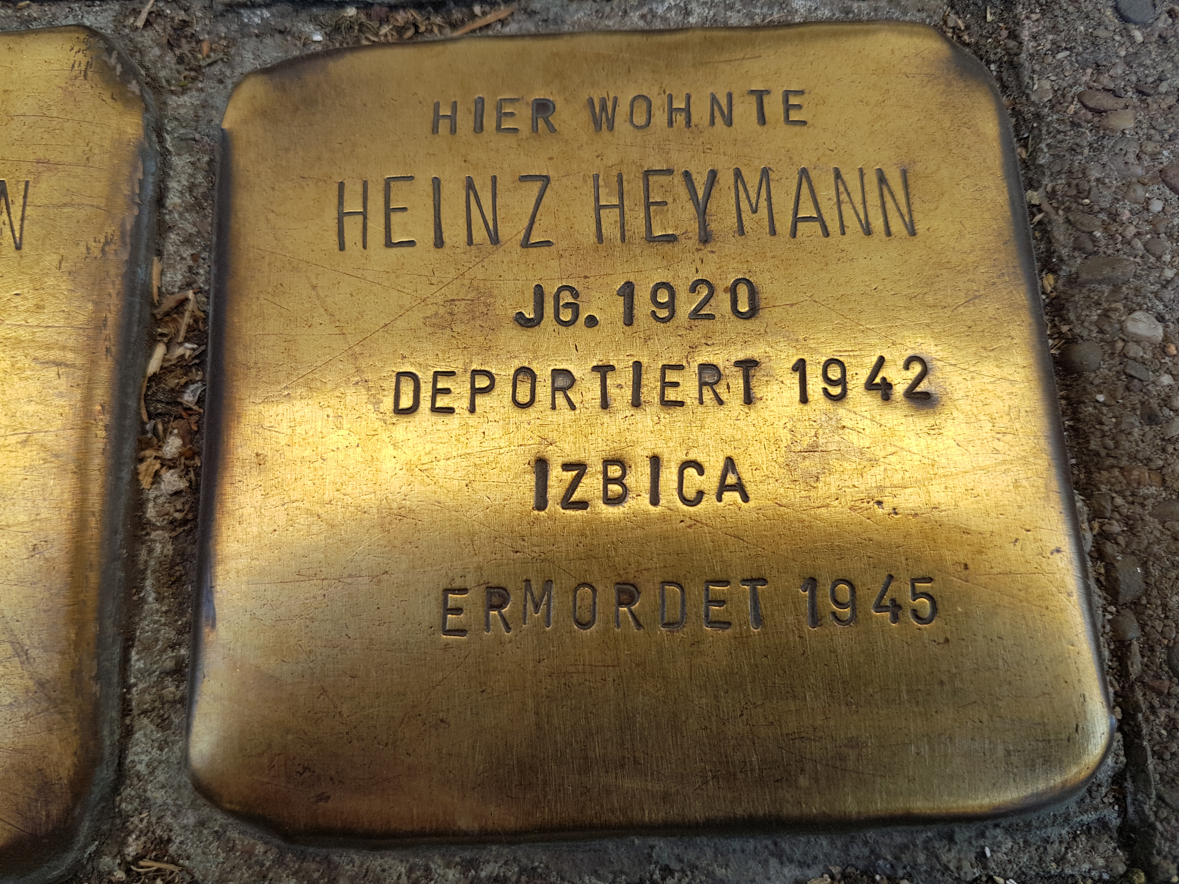 Stolperstein Duisburg Heinz Heymann